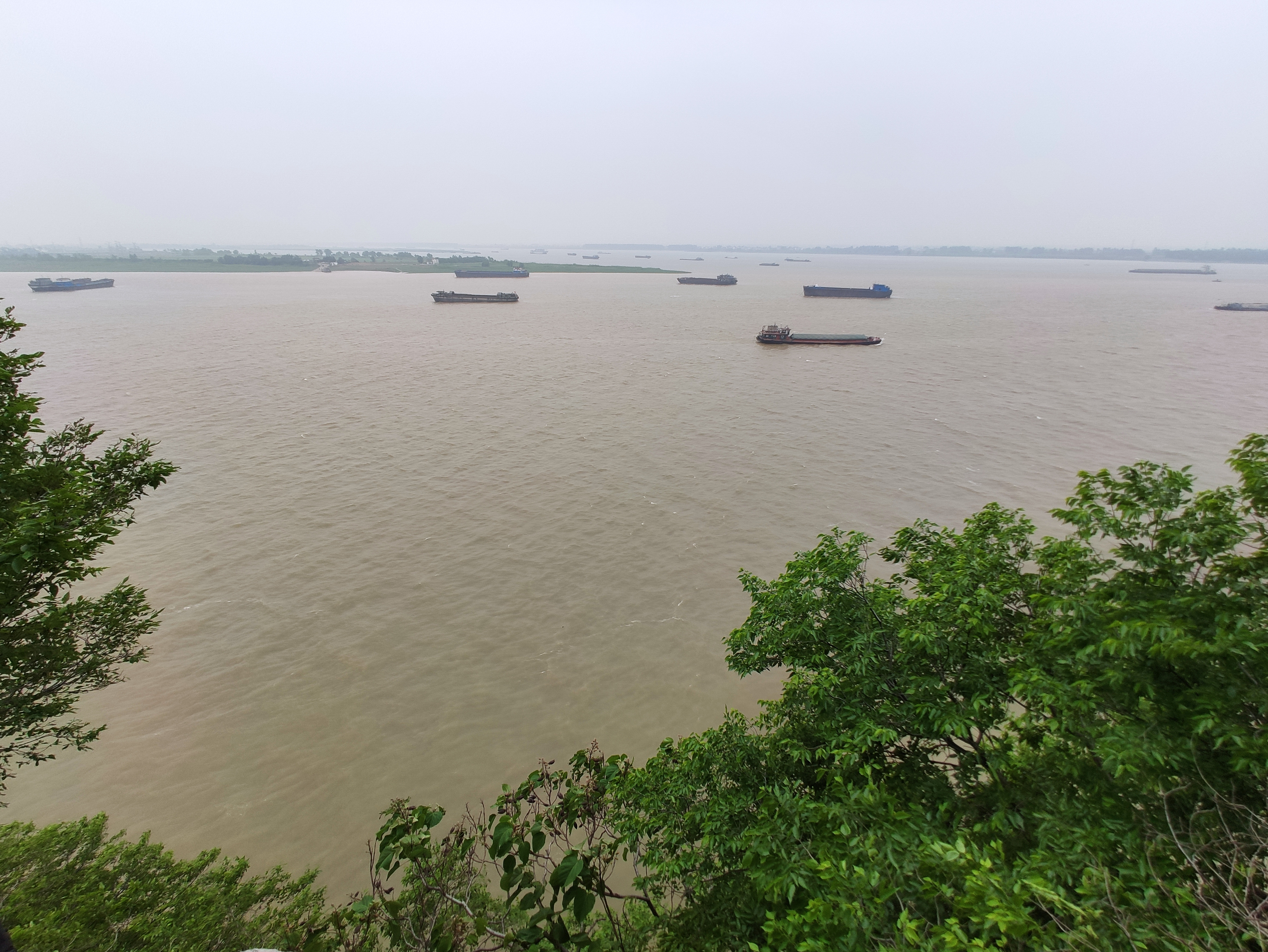 湖口石钟山远眺鄱阳湖口及长江